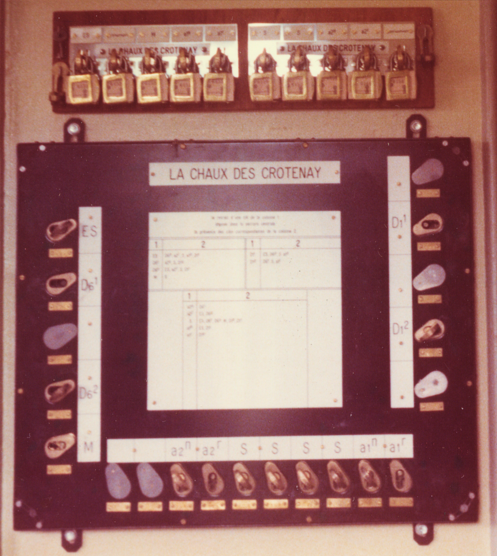 France - Chemin de Fer (Railway) - Ligne de Andelot à La Cluse - Gare (Station) de : La Chaux Des Crotenay - Voie unique - Serrure centrale d'enclenchement